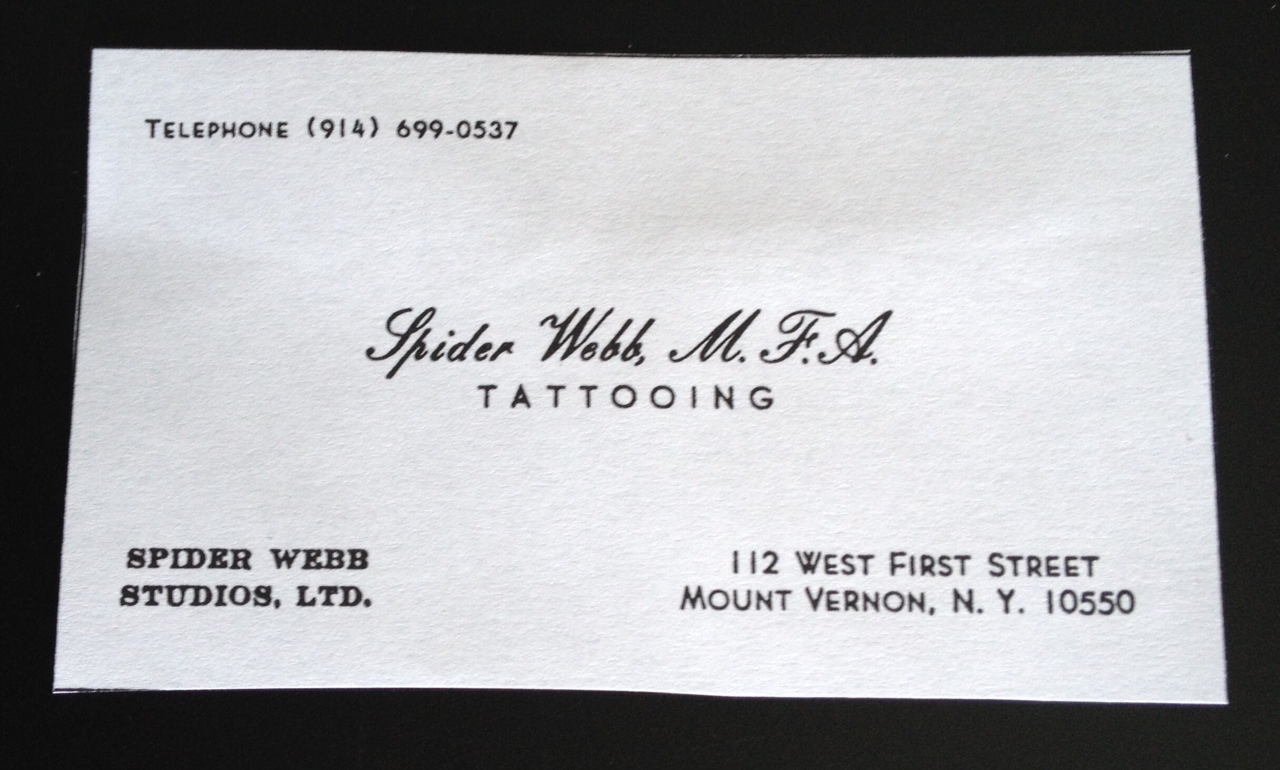 Spider Webb Karte 1977